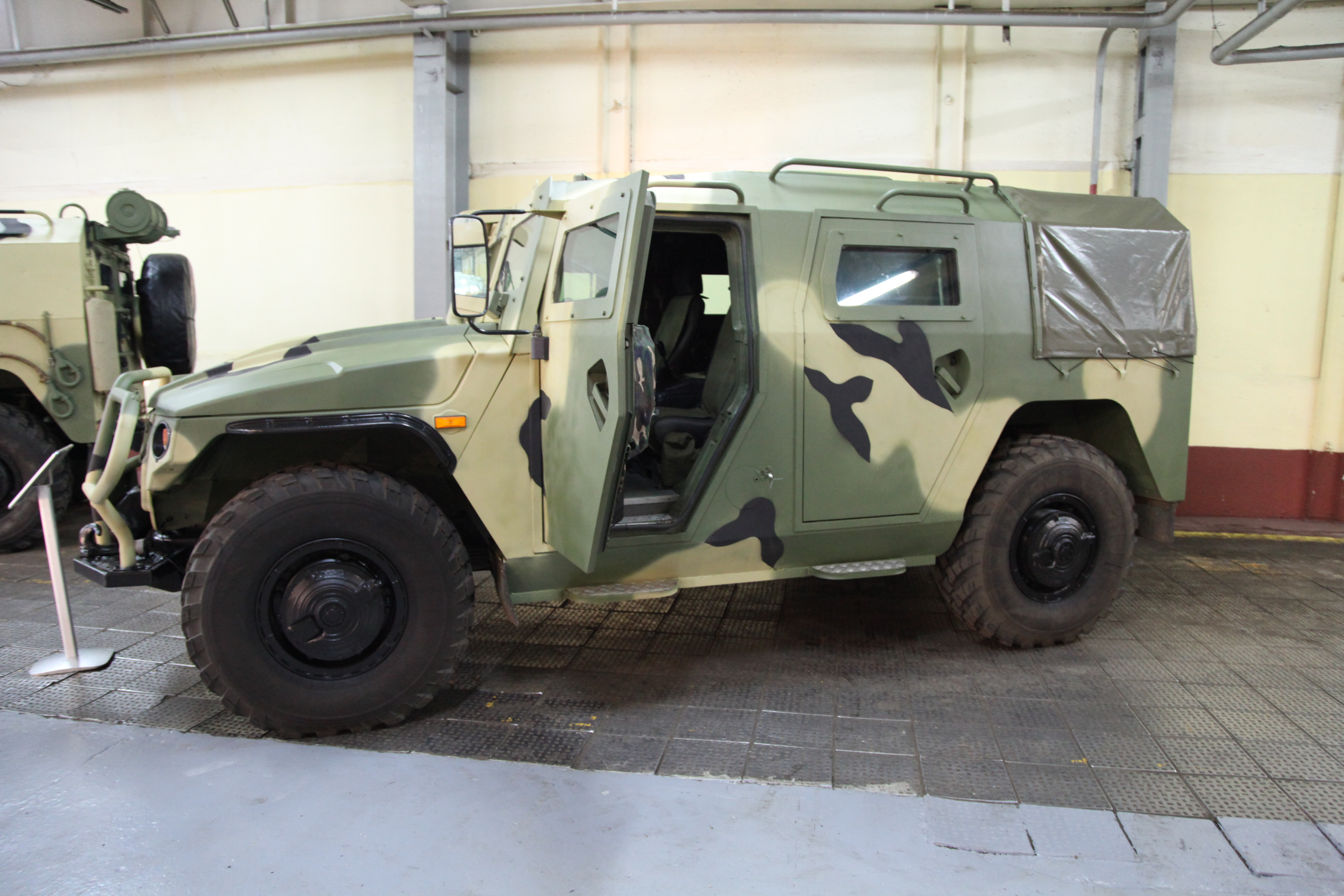 Тигр-6А (Tigr-6A)